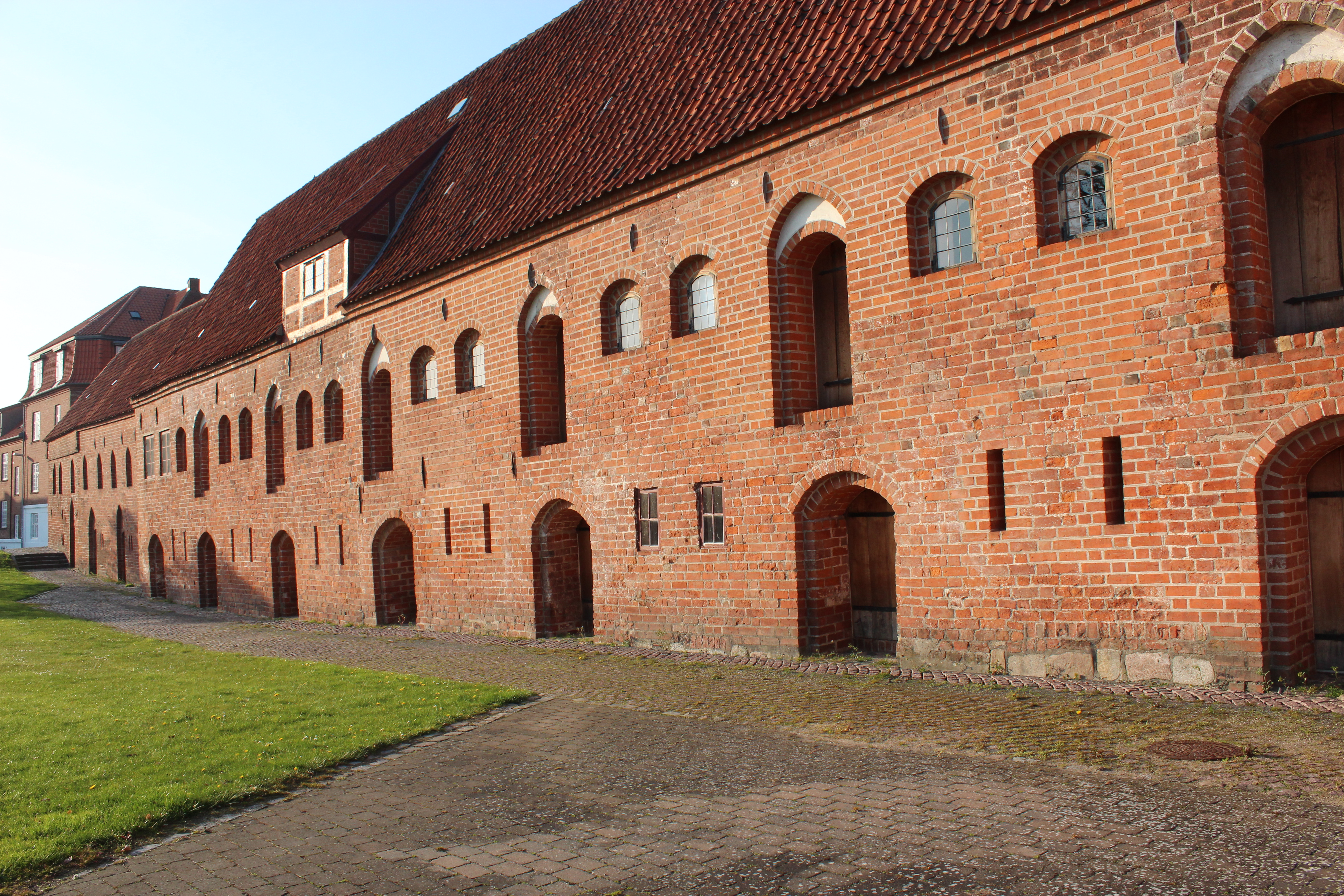 De to etager på boderne set fra syd. Nederst er kælderlokalerne.